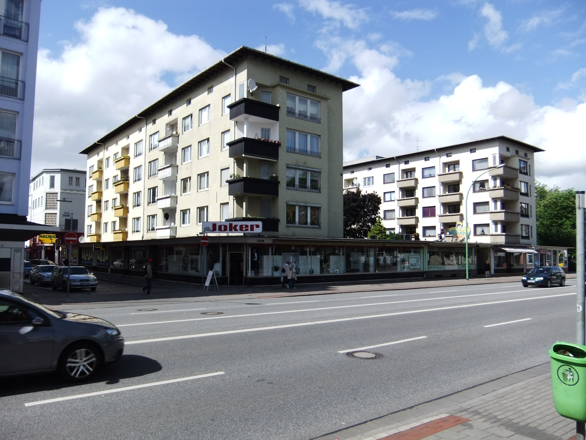 Wohnanlage in Bremerhaven, Lloydstraße 18 .Die Gesamtanlage ist ein geschütztes Kulturdenkmal in der Freien Hansestadt Bremen, mit der Nr. 3228 beim Landesamt für Denkmalpflege registriert.